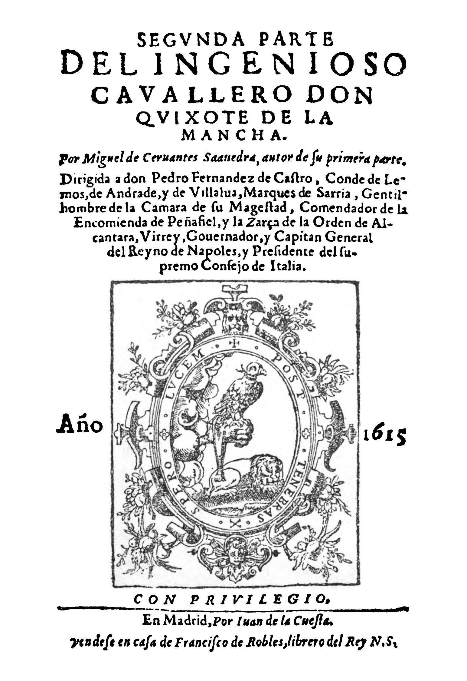 Portada de la primera edición de la segunda parte de El ingenioso cavallero Don Quixote de la Mancha, libro de Miguel de Cervantes. Publicado en Madrid, en 1615, en la imprenta de Juan de la Cuesta. Texto: SEGVNDA PARTE DEL INGENIOSO CAVALLERO DON QVIXOTE DE LA MANCHA. Por Miguel de Ceruantes Saauedra, autor de su primera parte Dirigida a don Pedro Fernandez de Castro, conde de Lemos, de Andrade, y de Villalua, Marques de Sarria, Gentilhombre de la Camara de su Magestad, Comendador de la Encomienda de Peñafiel, y la Zarça de la Orden de Alcantara, Virrey, Gouernador, y Capitan General del Reyno de Napoles, y Presidente del Supremo Consejo de Italia. Año 1615. CON PRIVILEGIO. En Madrid, Por Iuan de la Cueſta. Vendeſe en caſa de Franciſco de Robles, librero del Rey N.S. Iconografía: El escudo del impresor muestra un halcón de cetrería, un león dormido y la divisa «Post tenebras spero lucem» (Espero la luz después de las tinieblas). [1]